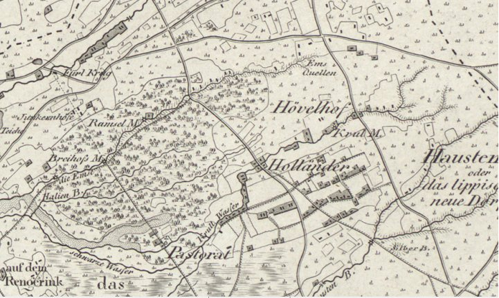 Hövelhof um 1805 (Ausschnitt einer Topographische Karte von Karl Ludwig von Le Coq)